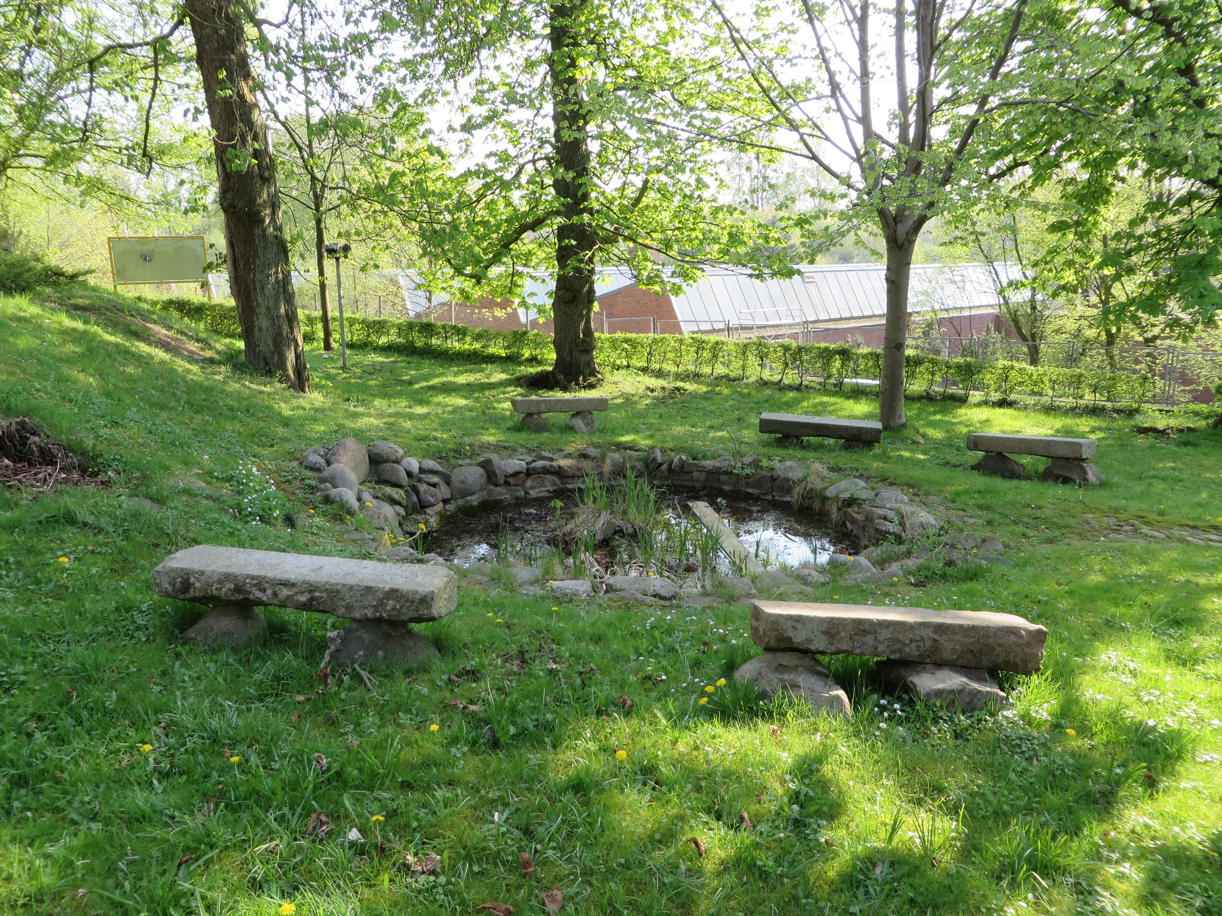 Gartenfläche mit Teich und Sitmöglichkeiten bei der St. Knudsborg